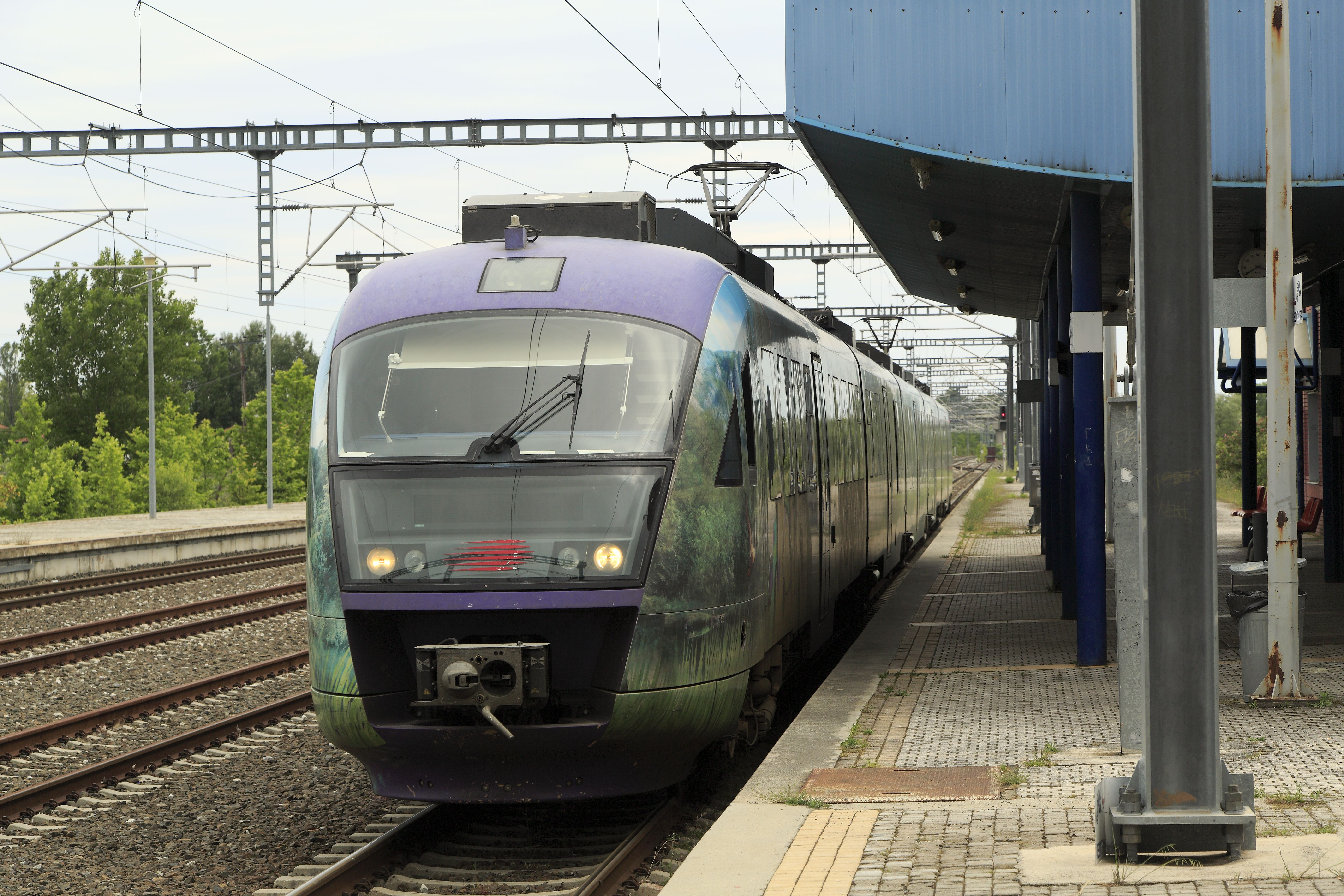 Proastiakós-Zug Thessaloníki–Larisa, Nachschuss. Die Fahrzeugnummern der griechischen Desiro-ET sind nicht an den Stirnseiten angeschrieben.